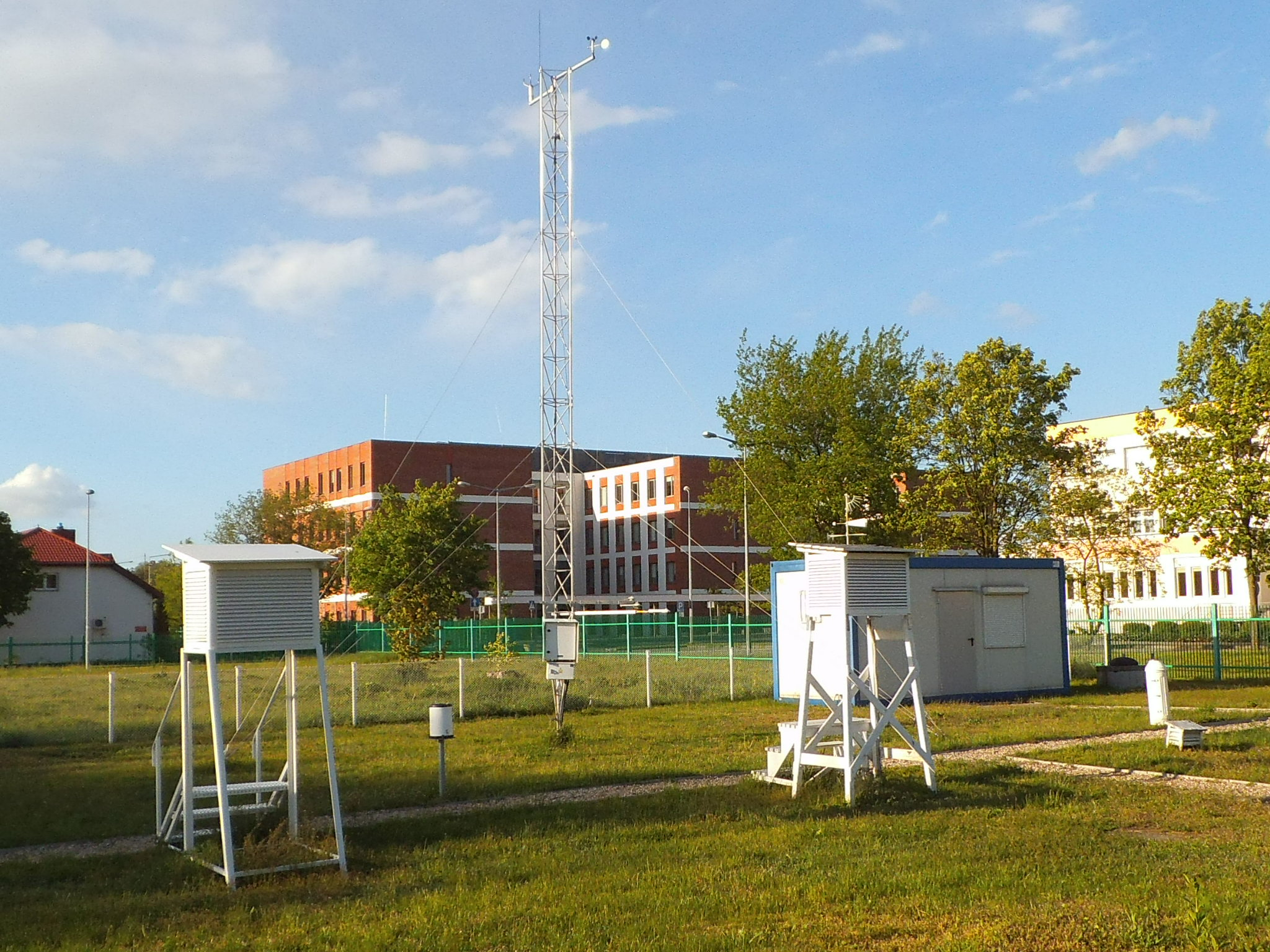 Obserwatorium Meteorologiczne UMK w Toruniu